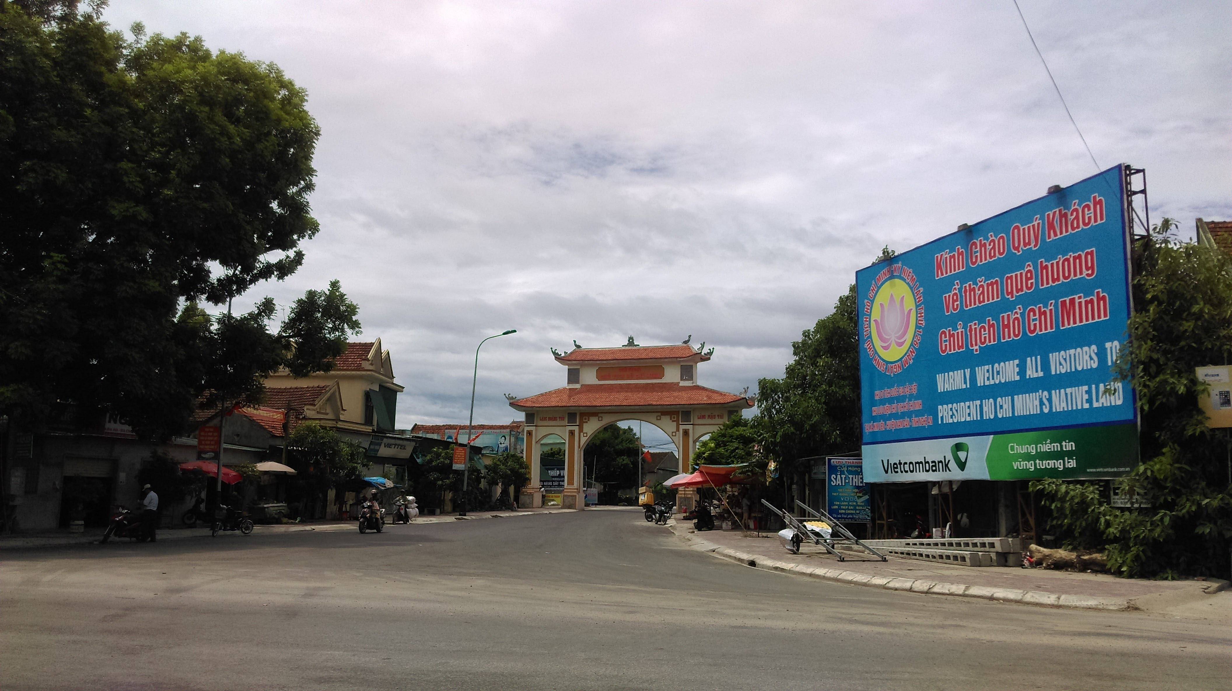 Cổng chào làng Hoàng Trù và Mậu Tài, Nam Đàn, Nghệ An